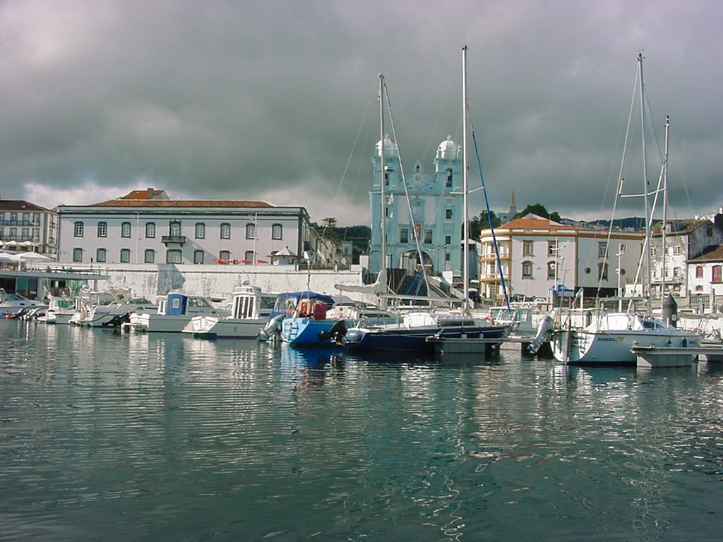 Baía de Angra do Heroísmo e igreja da Misericórdia, ilha Terceira, Açores, Portugal.